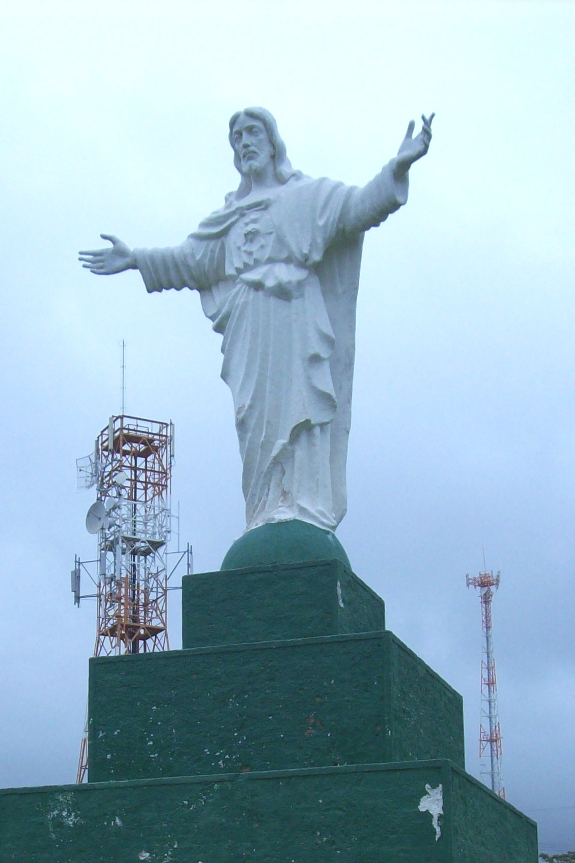 Estátua